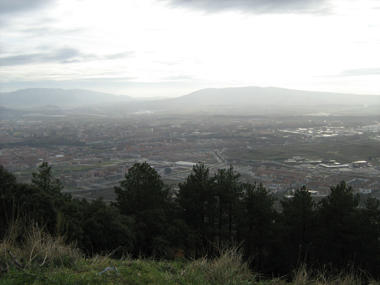 Vista de Iruñea/Pamplona desde el Monte Ezkaba